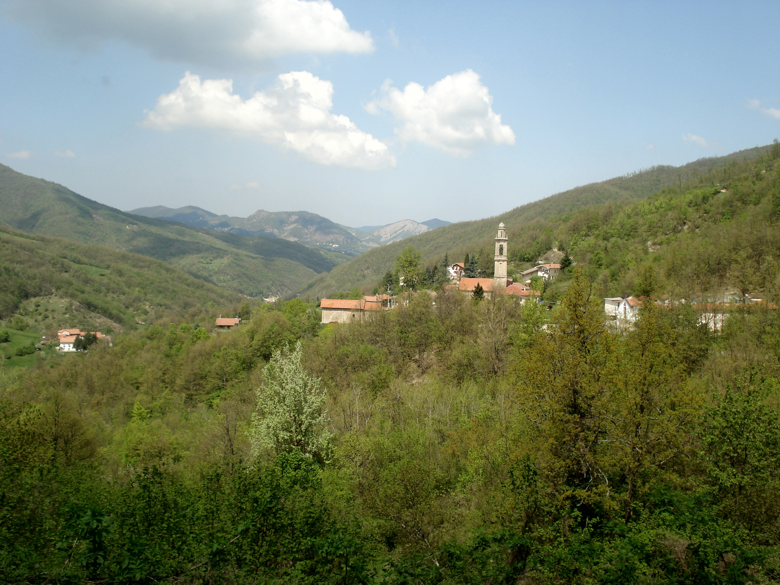 Frazione Maggiolo, Mongiardino Ligure, provincia di Alessandria